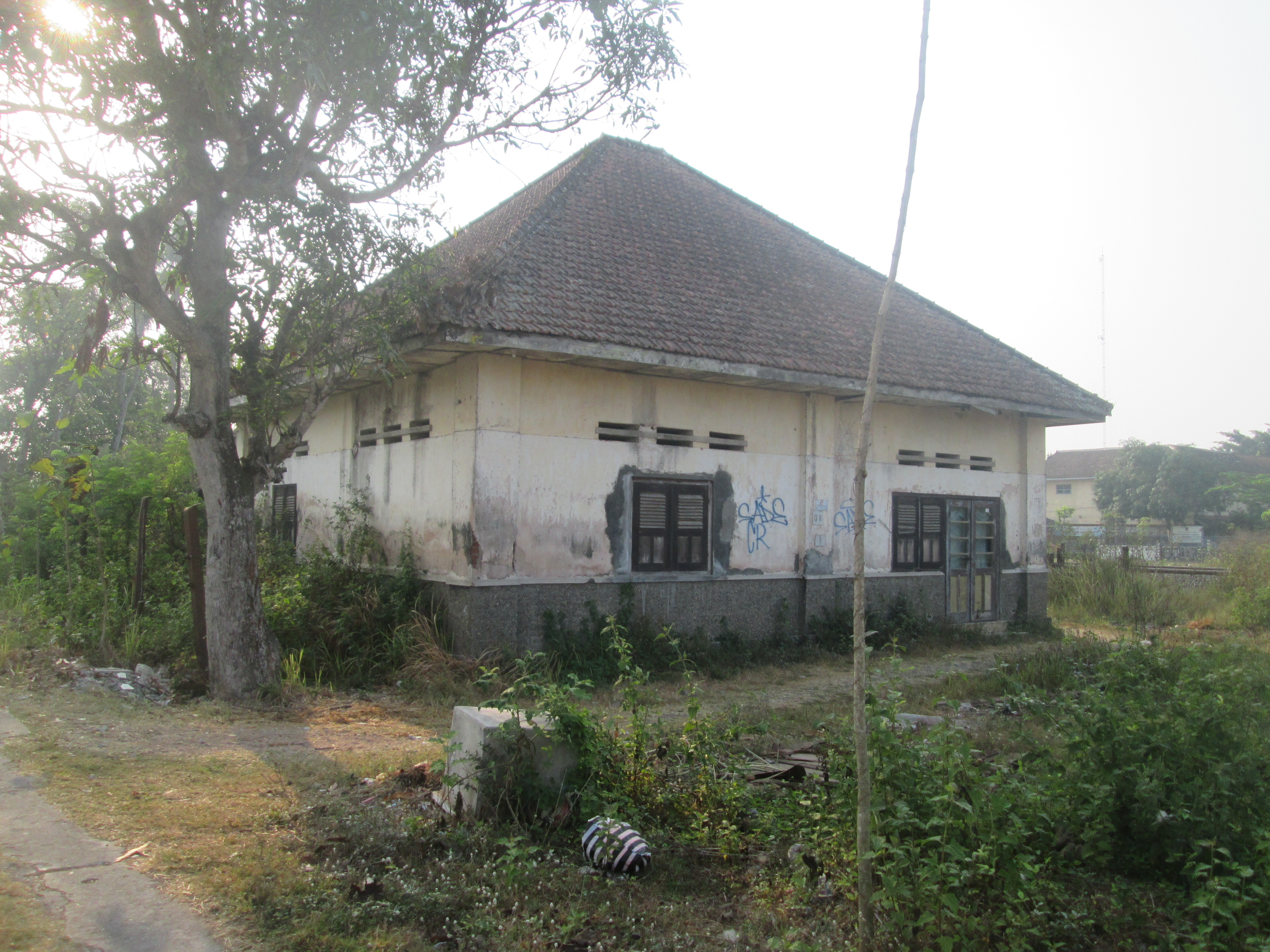 Bekas rumah dinas stasiun Sedayu